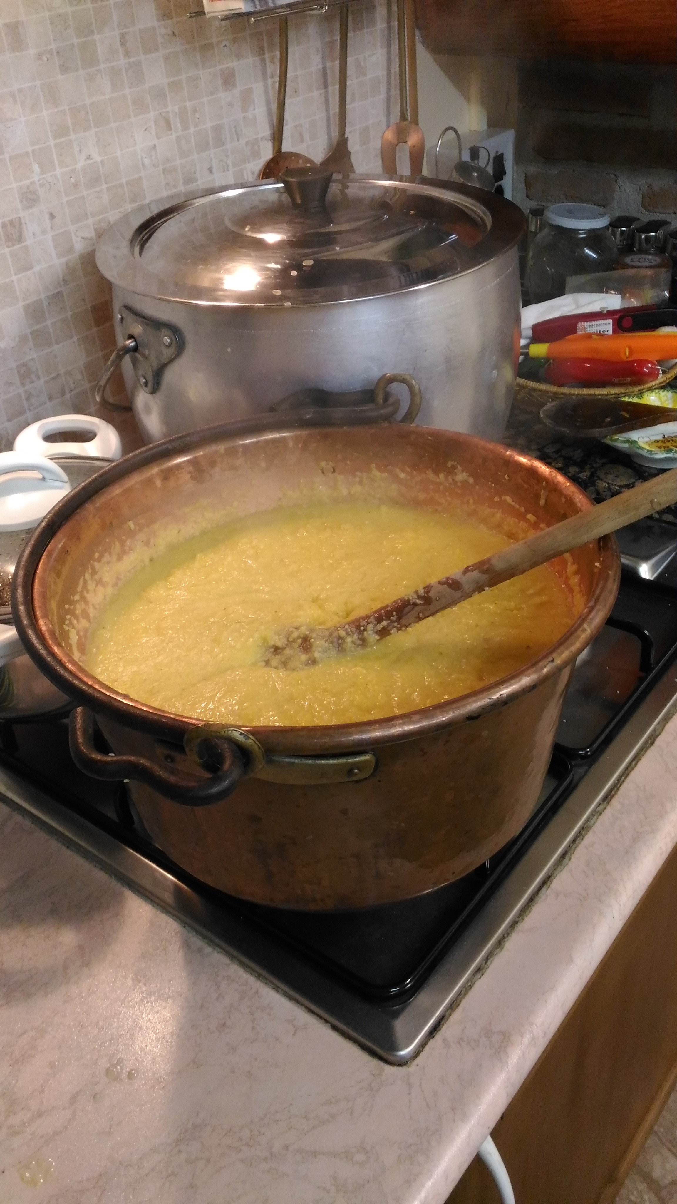 Preparazione polenta gialla.